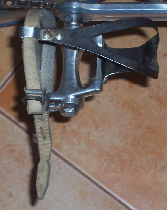 Pedał rowerowy szosowy Campganolo z noskami.